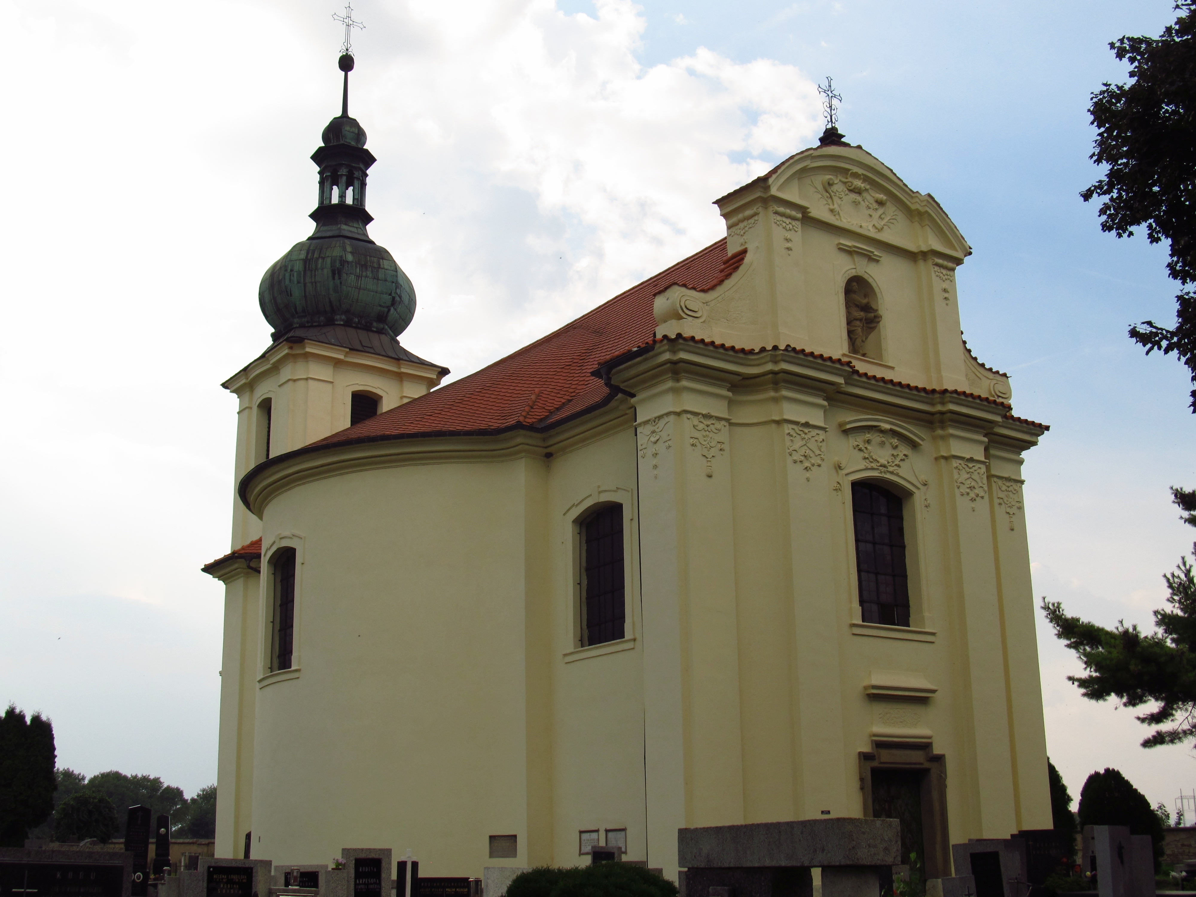 Kostel svatých Petra a Pavla, Doksany.